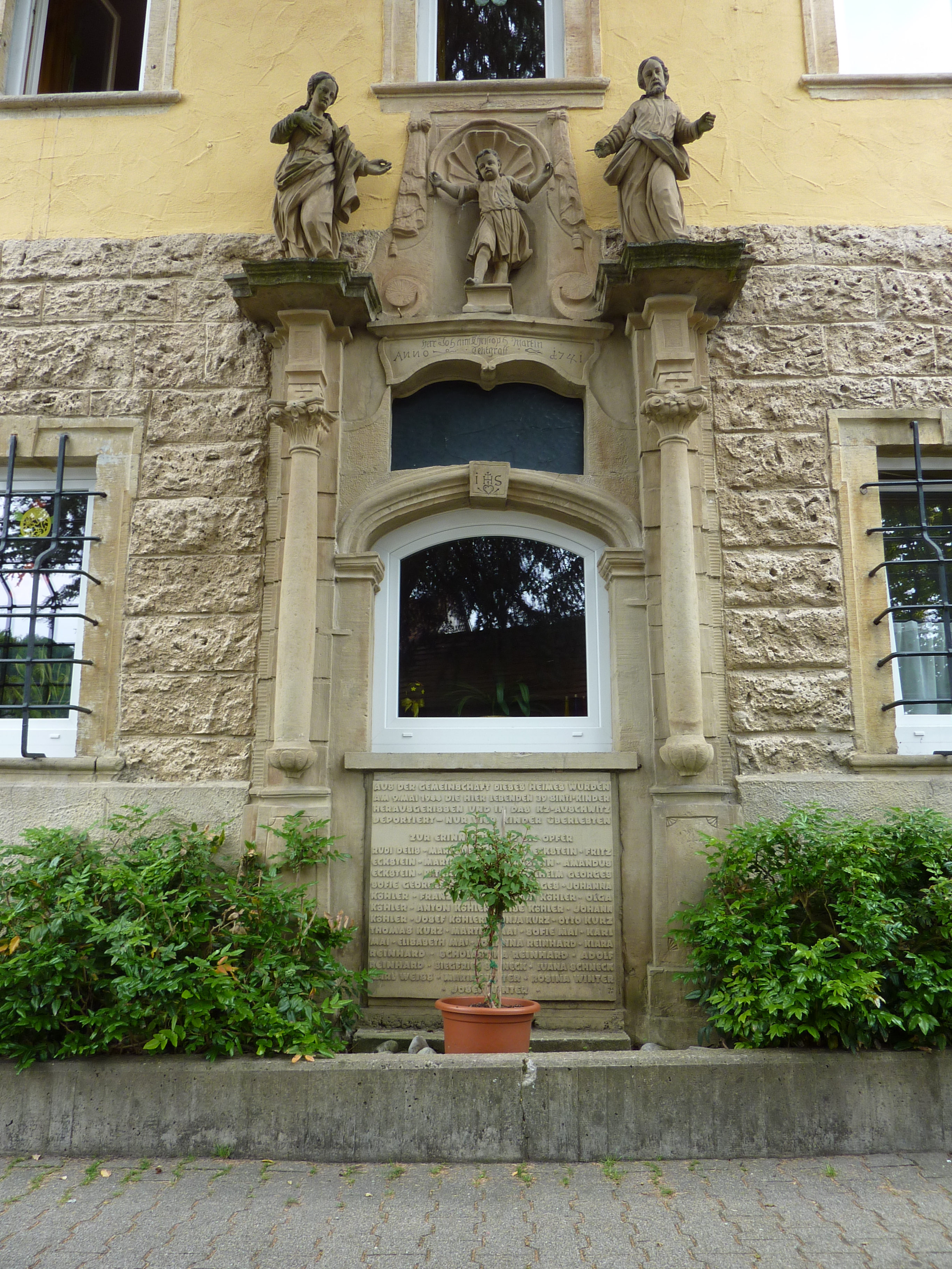 Fassadenschmuck und Gedenktafel für die ermordeten Sintikinder an der Josephspflege in Mulfingen